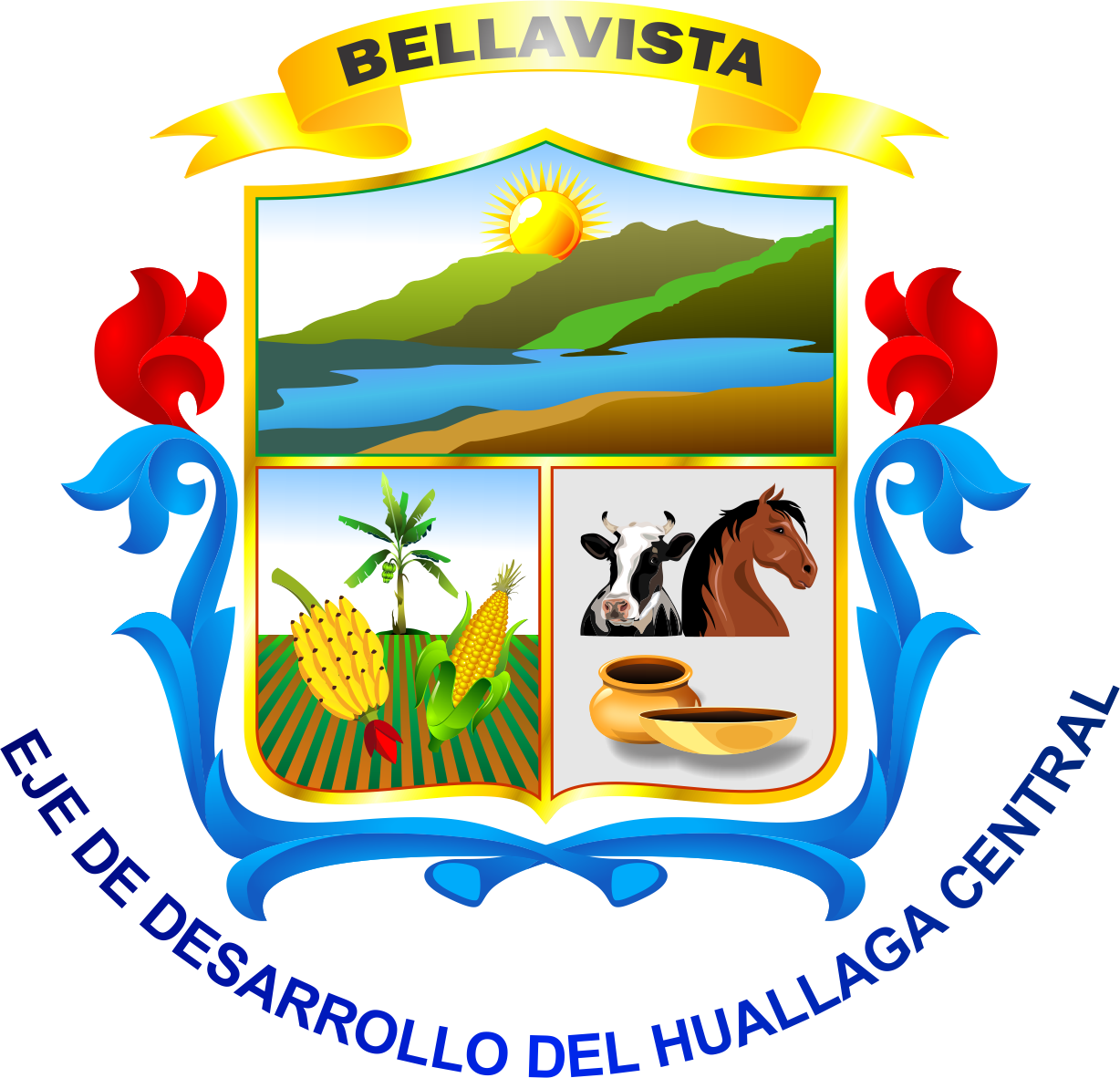 Escudo del Distrito de Bellavista - Provincia de Bellavista - Región San Matín